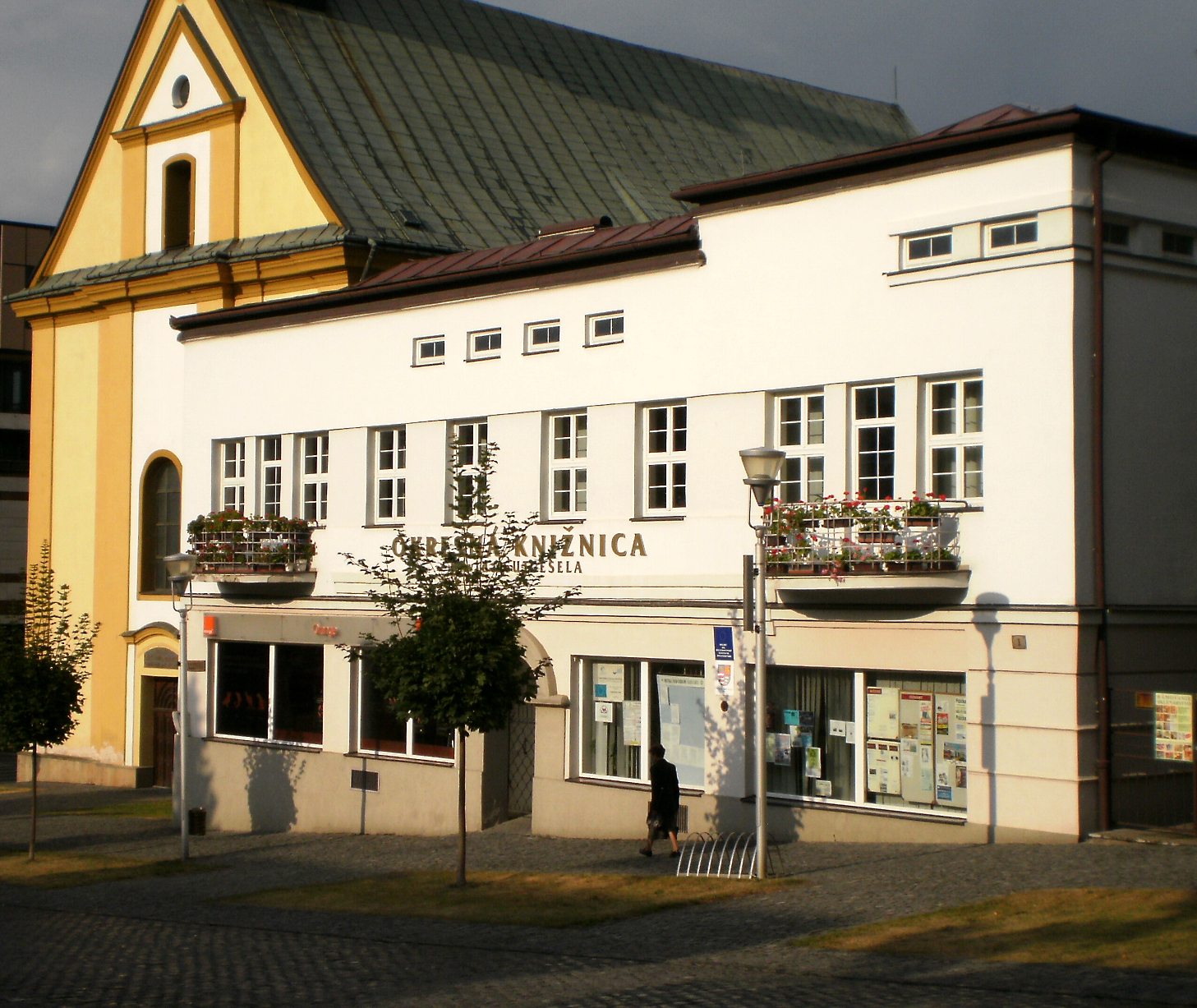 Knižnica